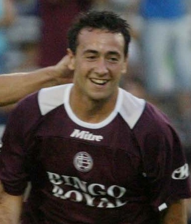 Futbolista Rodrigo Rengo Diaz